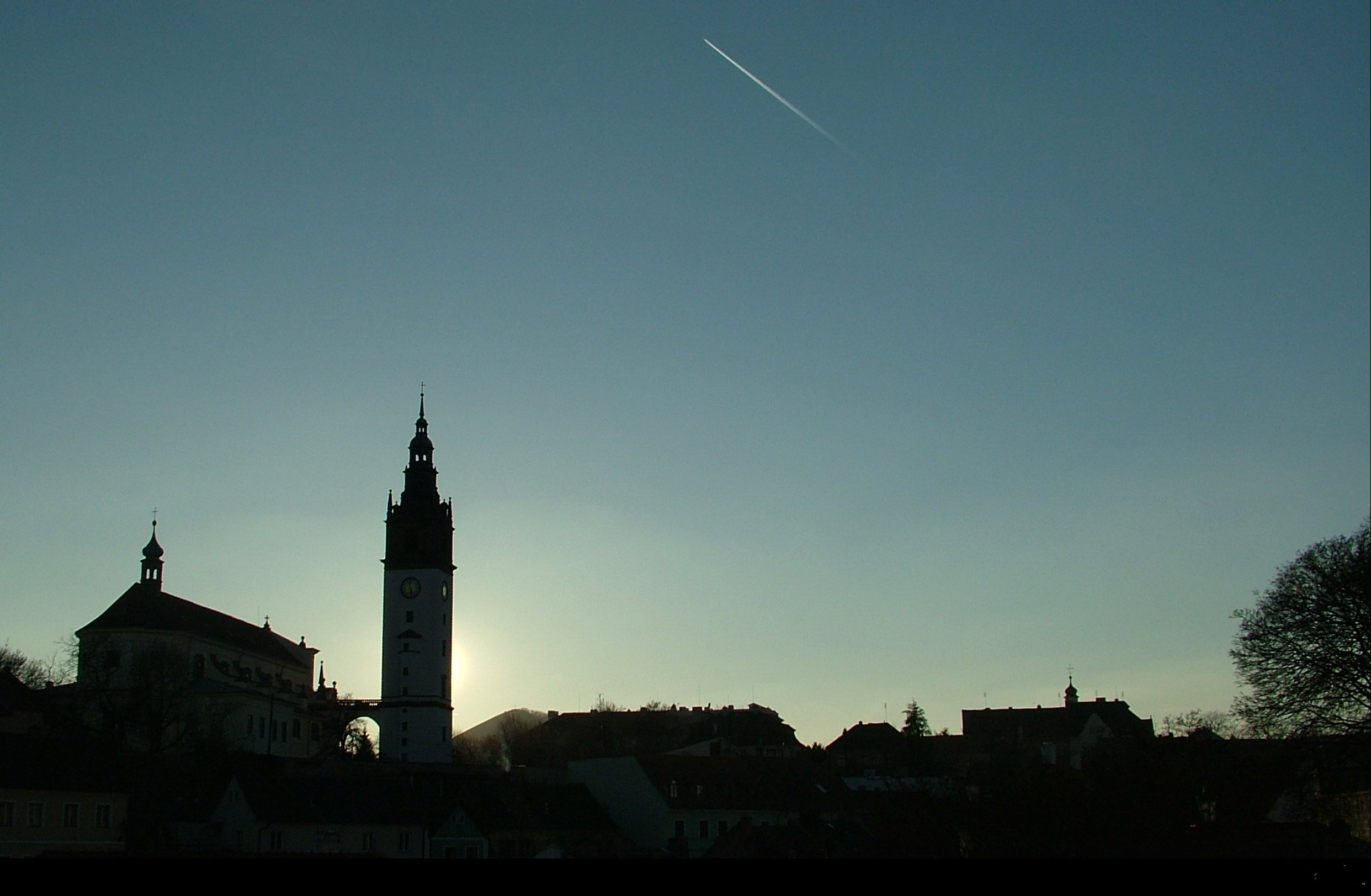 Pohled na Dóm z parkánu José Rizala.